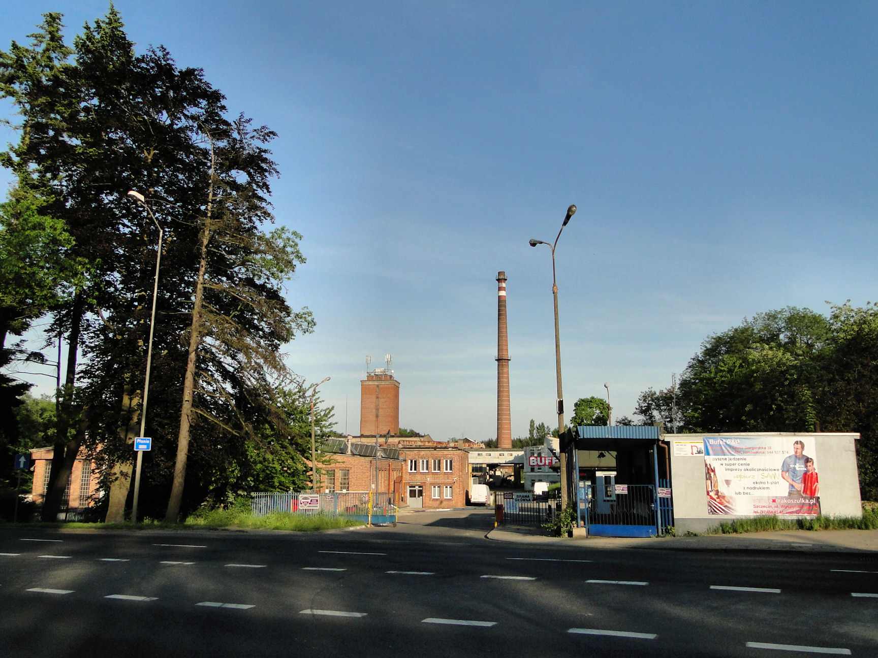 Dawna fabryka kontenerów w Szczecinie Strudze